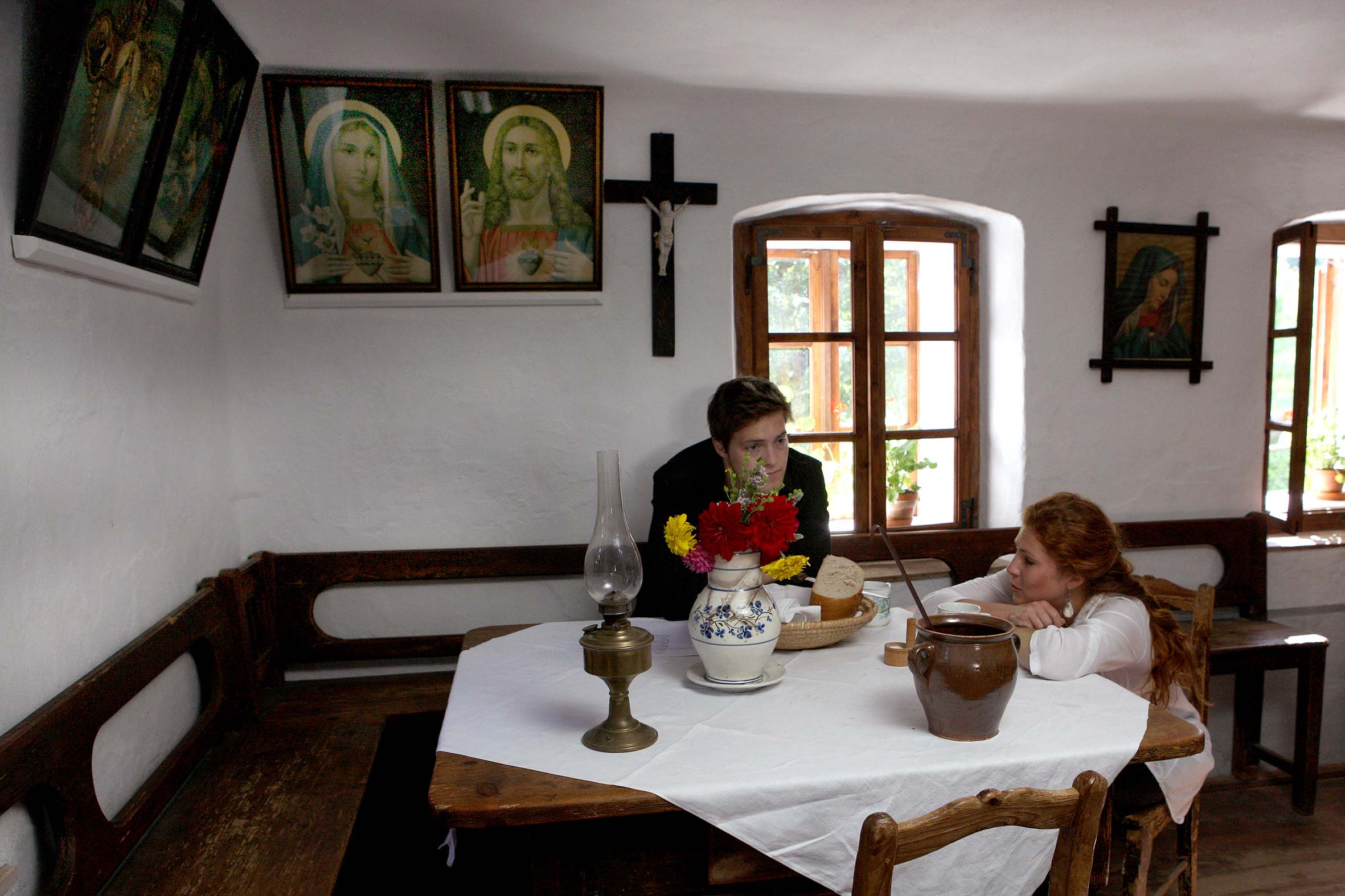 Průvodci pořadu se zamýšlejí nad osudem posledních majitelů nejstaršího vodního díla v ČR